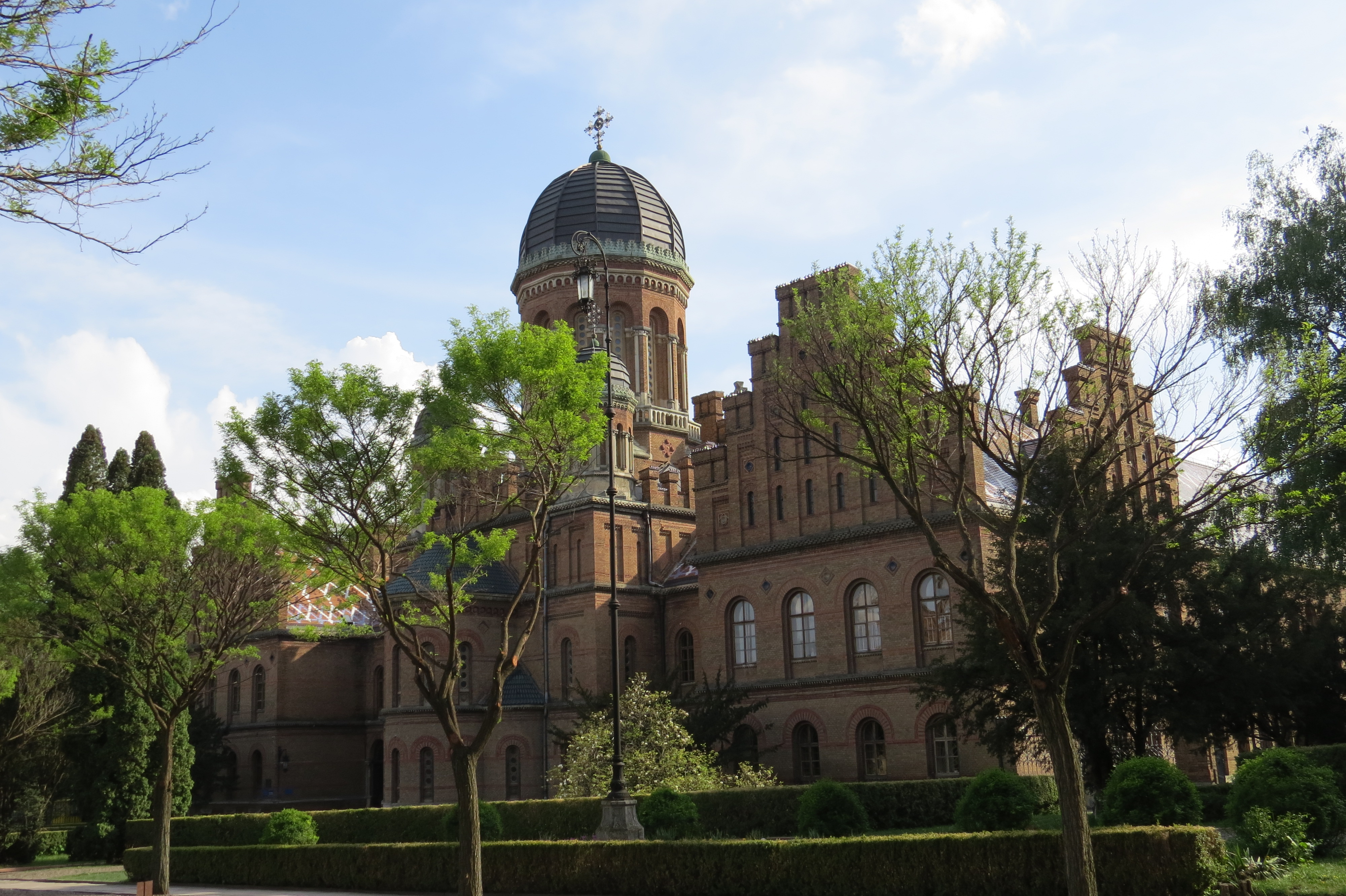 Семiнарський корпус (мур.), Чернівці, вул. Коцюбинського, 2